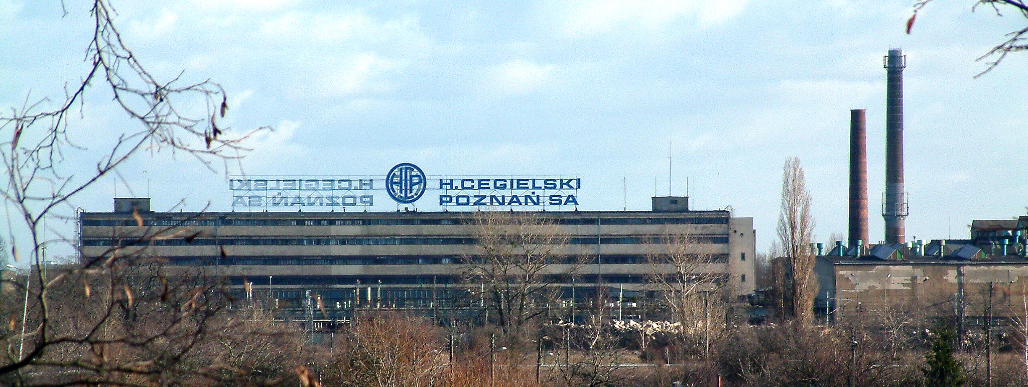 HCP factory, view from Górczyn, Poznań, Poland.